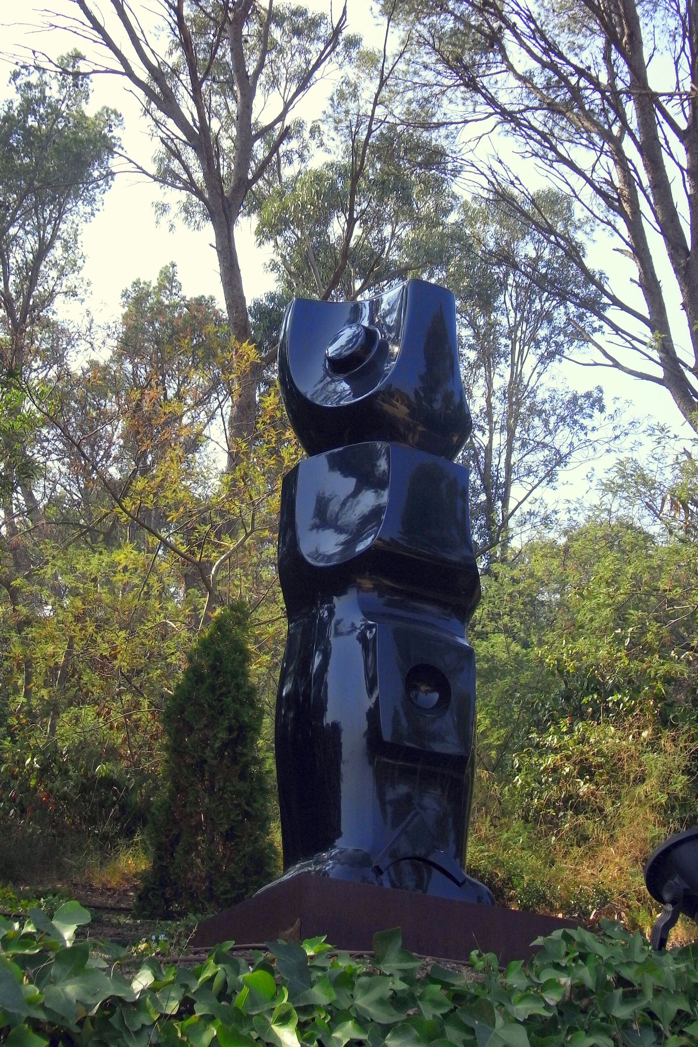 CALELLA de PALAFRUGELL . Jardí de Cap Roig "ERGO" 1970-2006 Marcel Martí (Alvear-Argentina 1925) Polièster i fibra policromada 328 x 72 x 72 cm